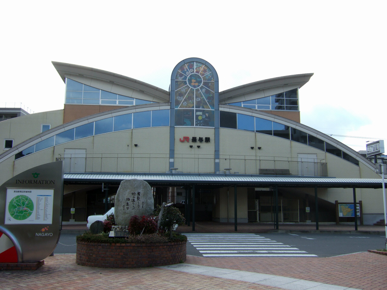 JR九州長与駅（JR-Kyushu Nagayo Station）